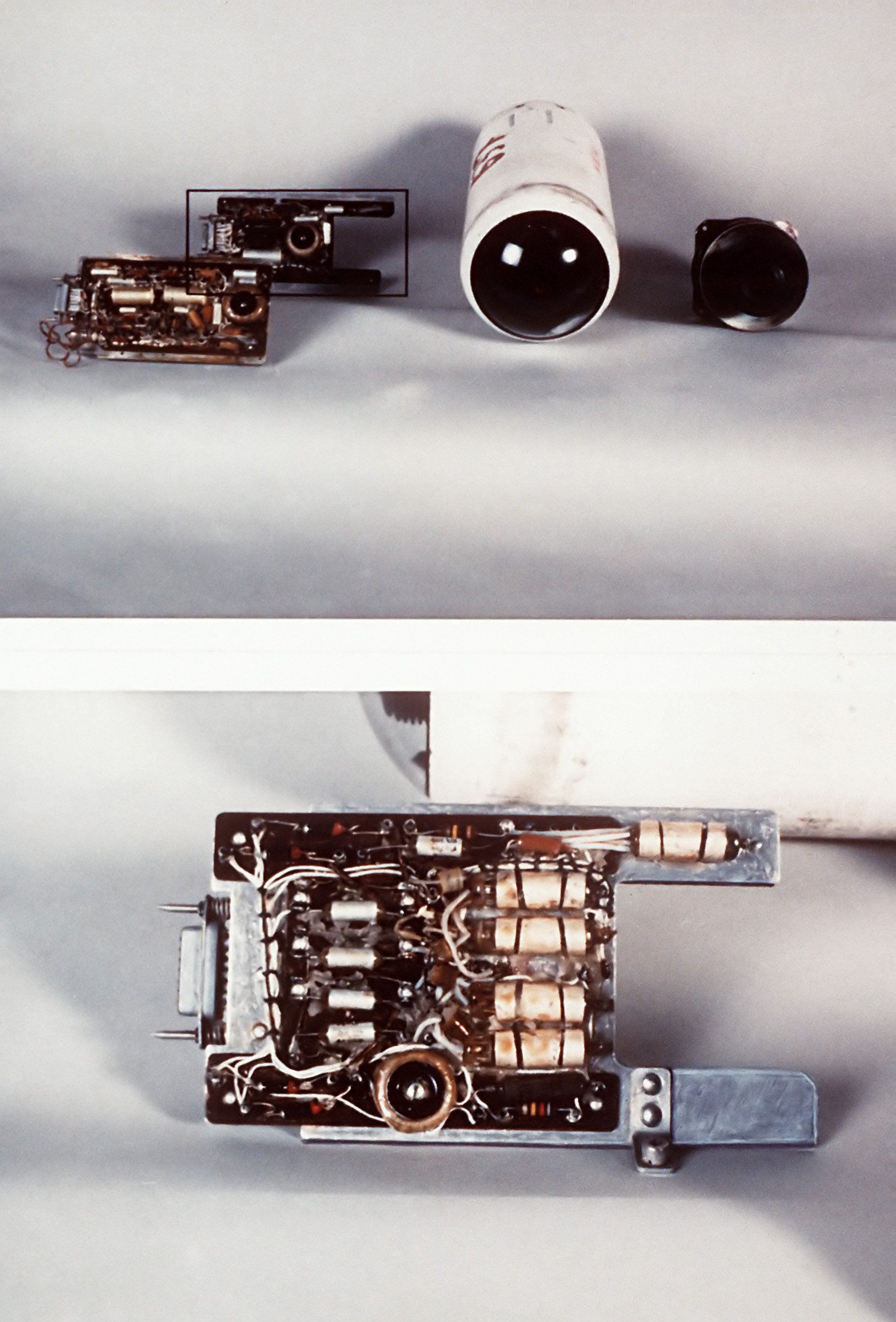 Bearbeitete Version von File:AA-2 seeker.jpg durch Hd pano Original-Beschreibung: (Autor: Hd pano; Uploaded by Benutzer:Wikifreund) A close-up view of an infrared seeker from a Soviet AA-2D Atoll air-to-air missile. (Released to Public) Original Uploaded with Reworkhelper